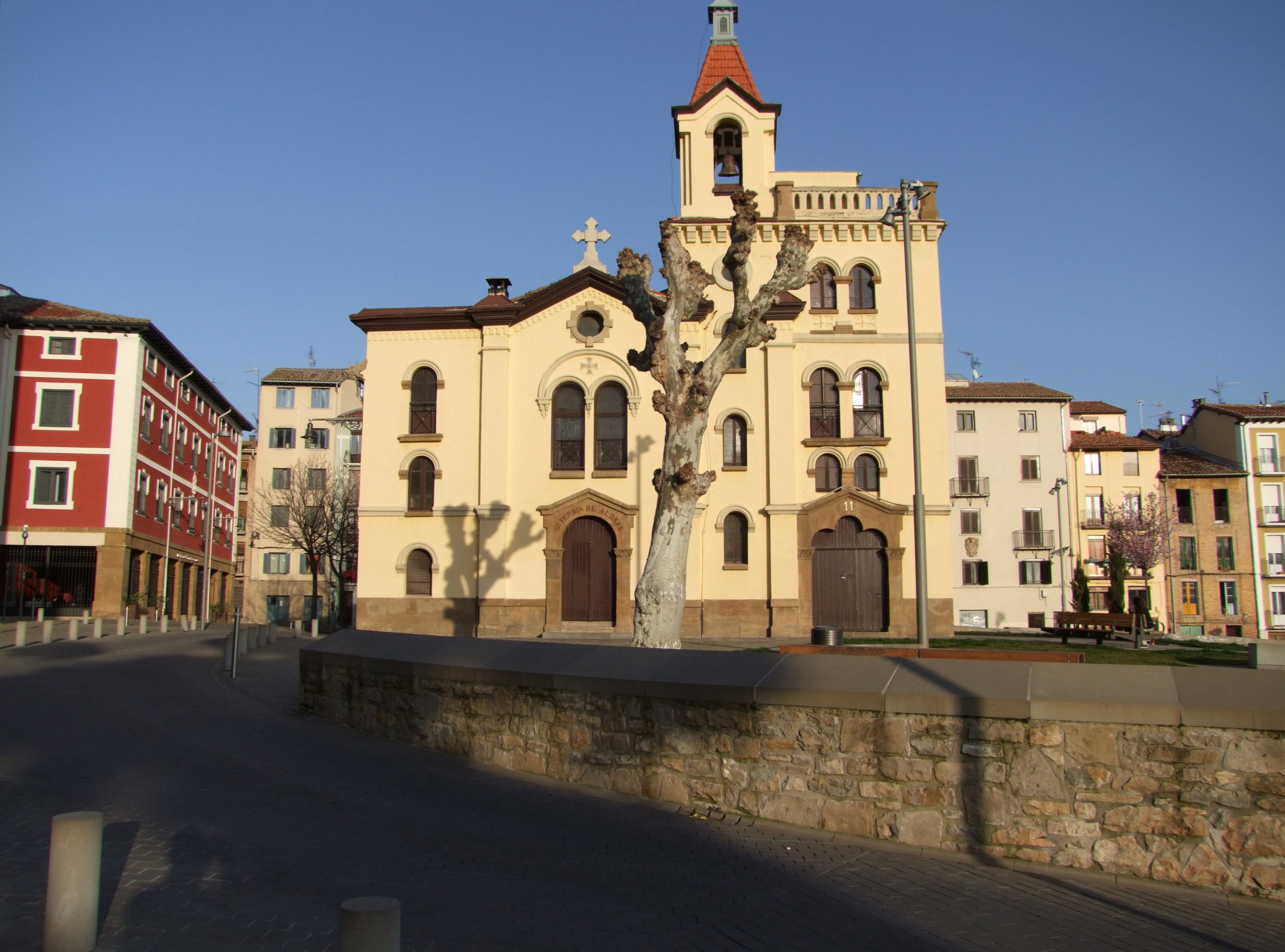 INAP, hots, Nafarroako Administrazio Publikorako Institutuaren XXV. urtemuga izan da martxoaren 9an Iruñeko alde zaharrean. Bertan mintzaldia eman dut etorkizuneko formakuntzaz. Crowdsourcinga formakuntzan sartzeko aukera ere aipatu dut. Eskerrik asko Tomás Rodríguez Garraza jaunak zuzentzen duen INAP erakundeari, Álvaro, Iñaki eta Marimar lagunei ere. Eta eskerrak ere, Javier Caballero presidenteordeari ere. Izan daitezen fotoak gertakari honen gomutagarri betirako. En el 25 aniversario del INAP (Instituto Navarro de la Adminsitración Pública), he tomado parte en el evento con una conferencia sobre el futuro de la formación. He comentado la posibilidad de integrar el crowdsourcing en la formación. Doy las gracias a D. Tomás Rodríguez Garraza, director del INAP; a Álvaro Martínez, a Iñaki, a Marimar y a los demás amigos que he dejado en la vieja Iruña. También mi agradecimiento al vicepresidente D. Javier Caballero. Sirva estas fotos y el vídeo como recuerdo para siempre de este evento.